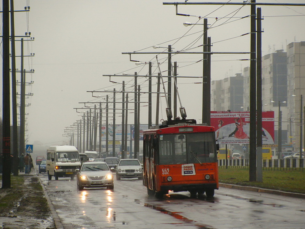 Тролейбус на Санту.jpg: перший день роботи тролейбусної лінії на Санта-Барбару